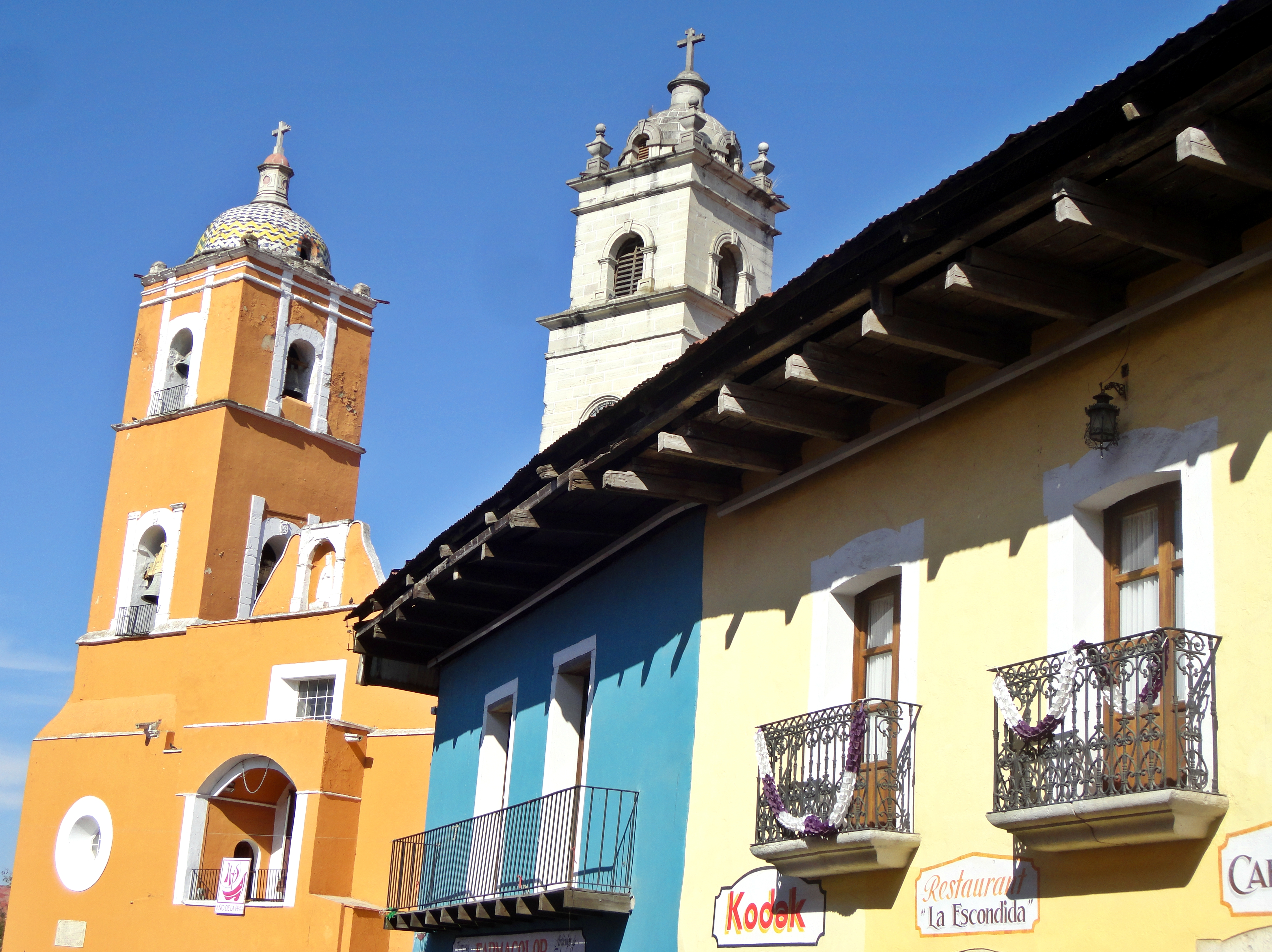 Parroquia de Nuestra Señora de la Asunción - Real del Monte, Hidalgo, México.